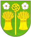 znak obce Liboš